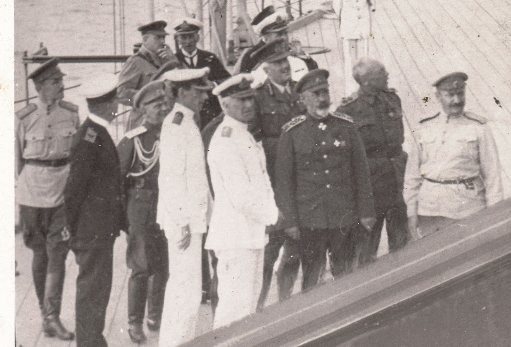 Генералы А. И. Деникин и И.П. Романовский с группой офицеров-союзников